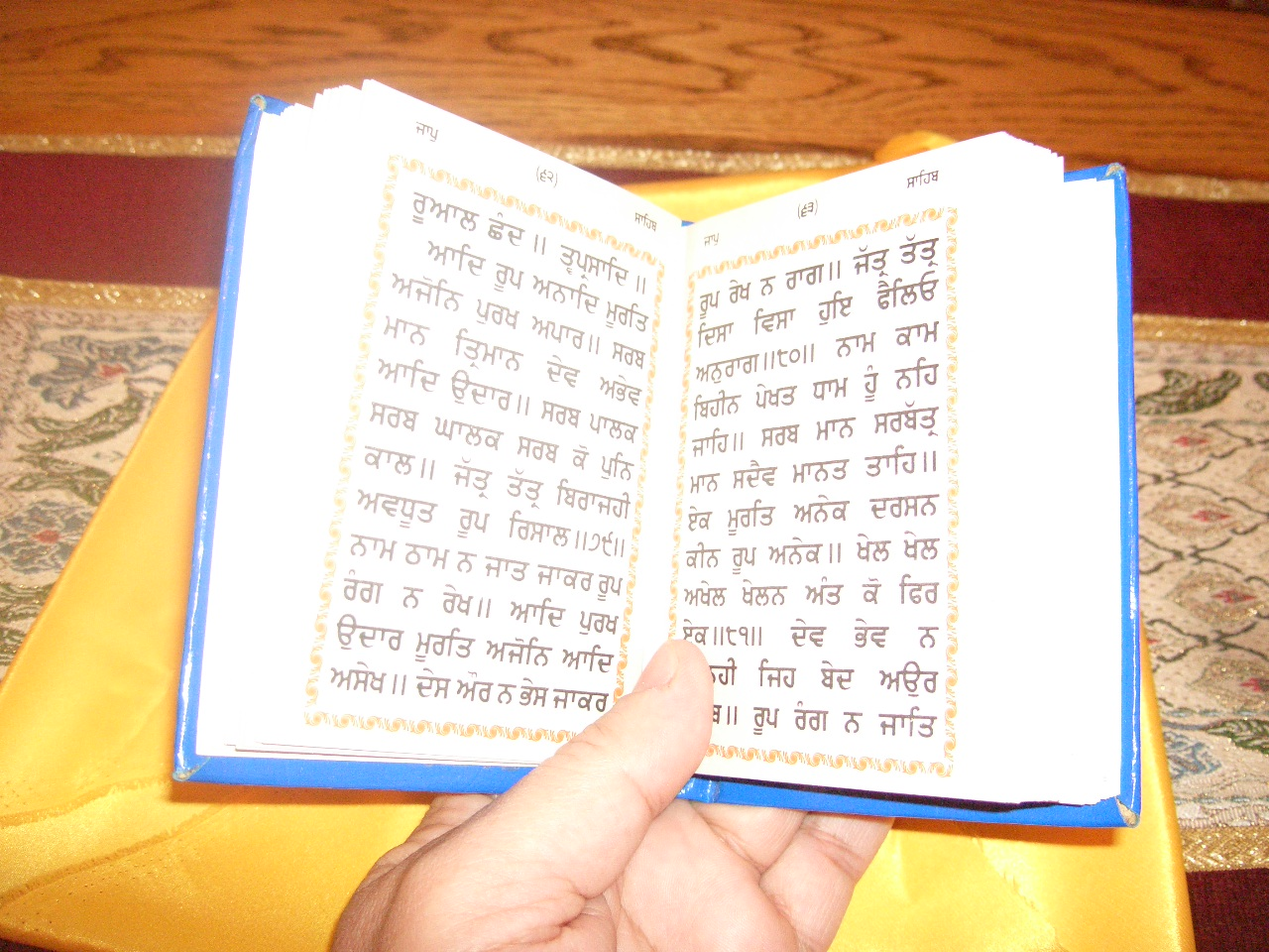 Photo d'un livre sikh de prières appelées Banis ou Gurbanis